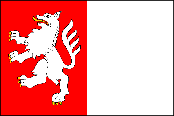 vlajka, Vlkoš, okres Přerov